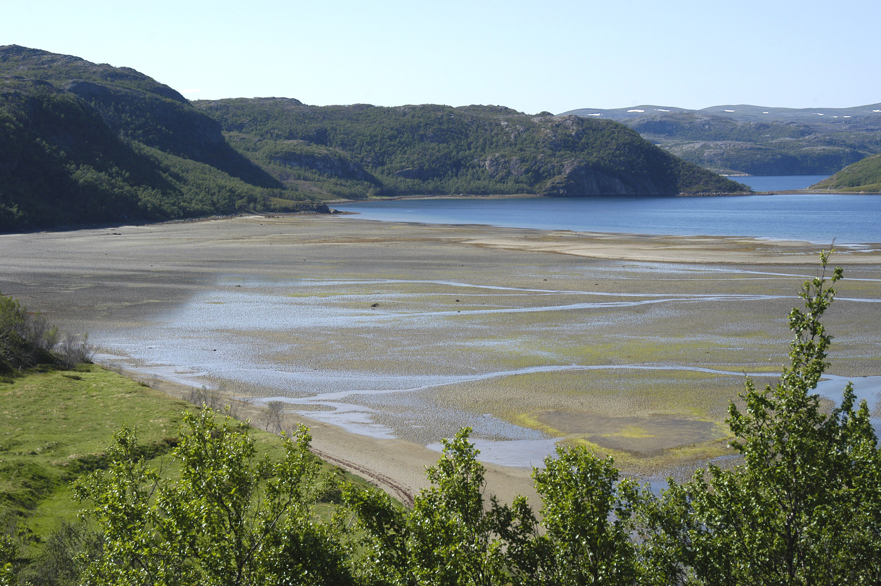 Adamsfjord in Lebesby, Norway